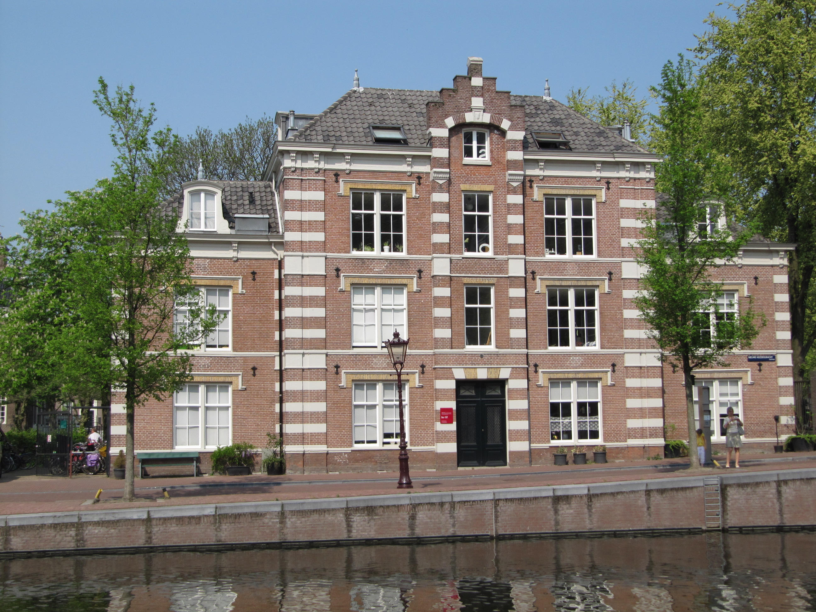 RM518476 Amsterdam - Nieuwe Keizersgracht 9.jpg